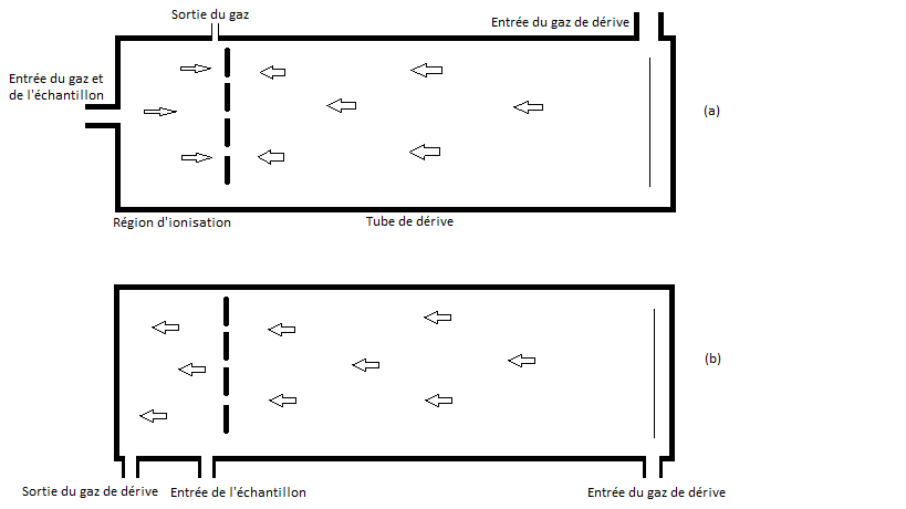 Direction du flux gazeux en spectrométrie à mobilité ionique